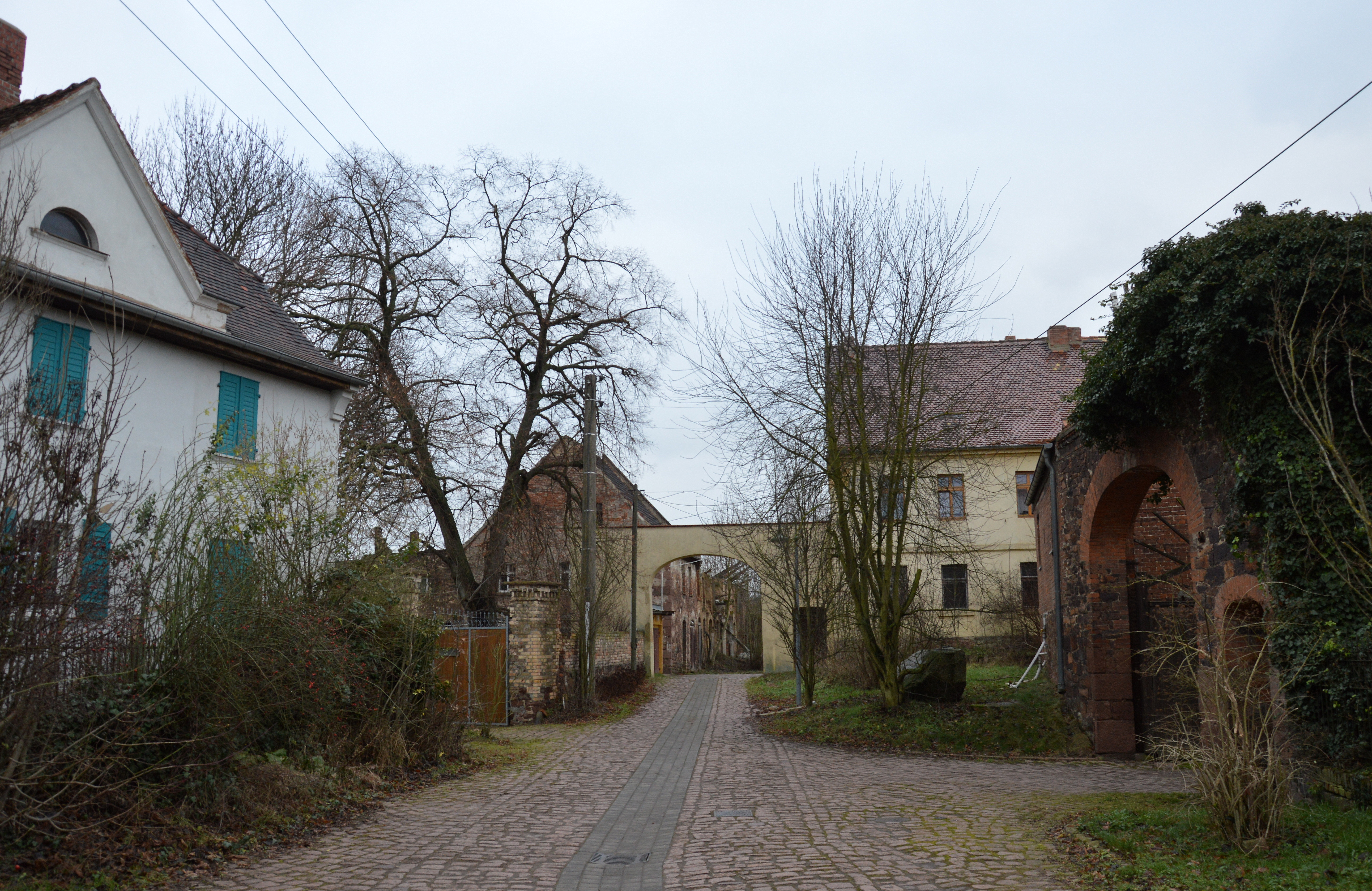 Dachritz 3, 5, 8